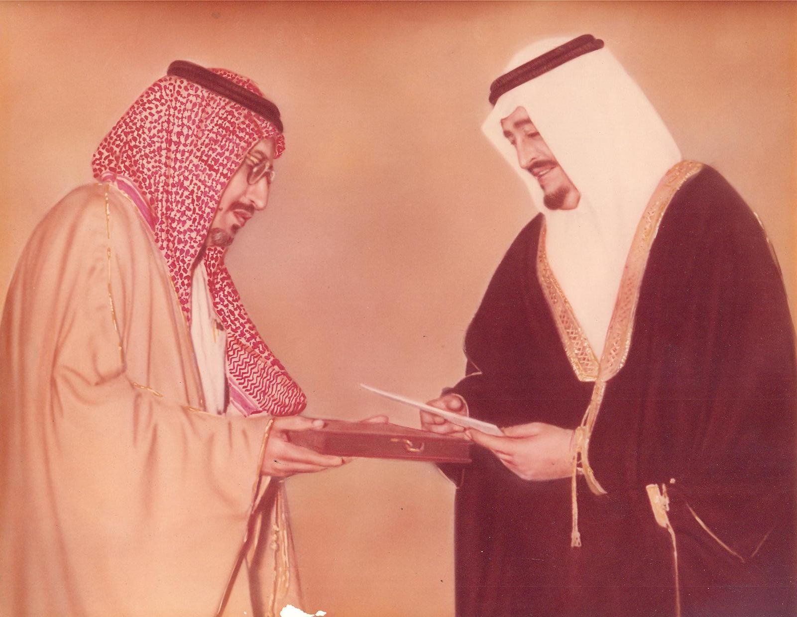 خادم الحرمين الشريفين الملك فهد بن عبد العزيز وهو يتسلم الشهادة المقدمه للمملكة العربية السعودية من المنظمة العالميه للزراعة و الأغذية (FAO) التابعة للأمم المتحدة .